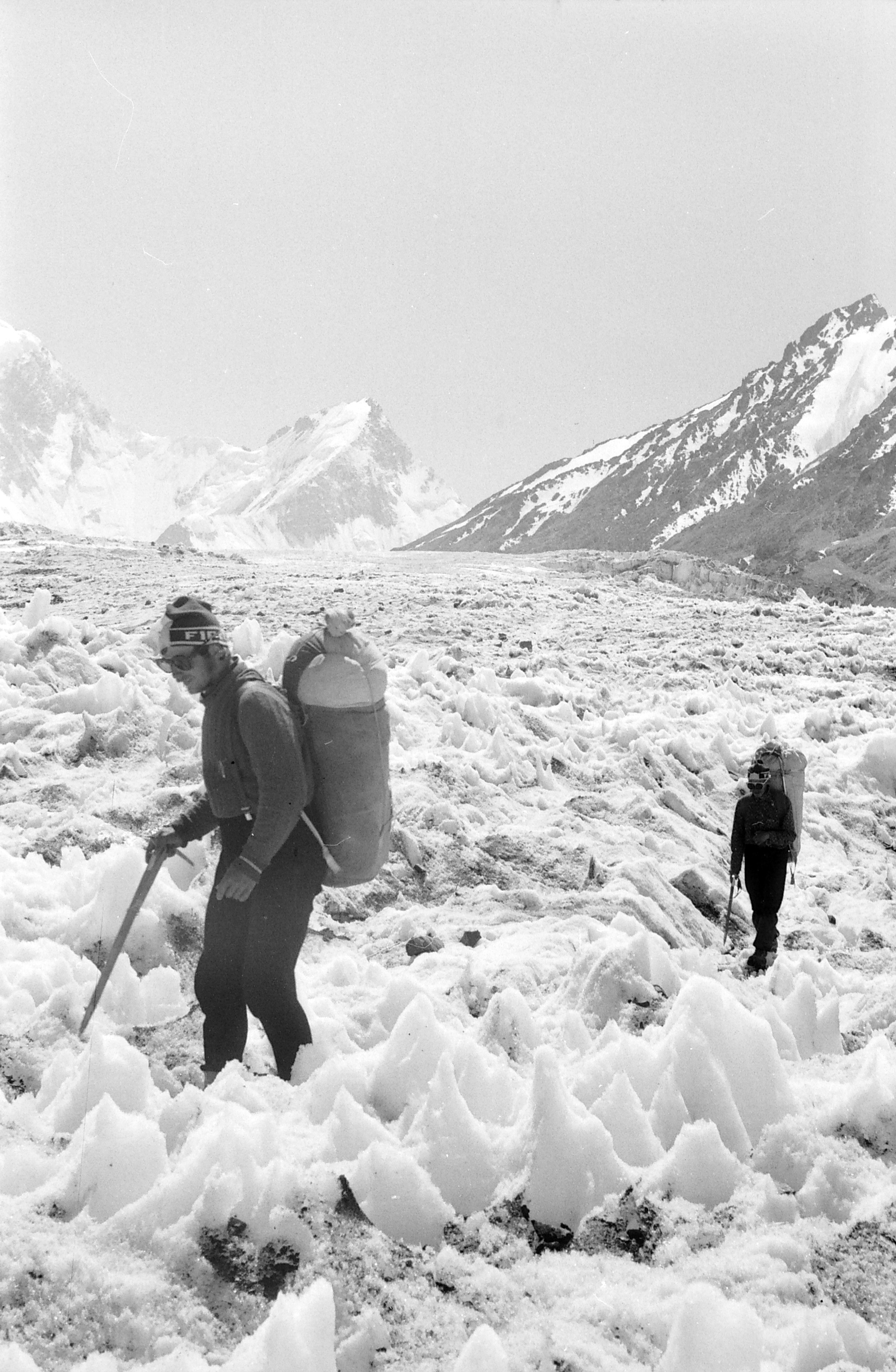 Ekspeditsioon mäetipule "Tartu Ülikool 350".